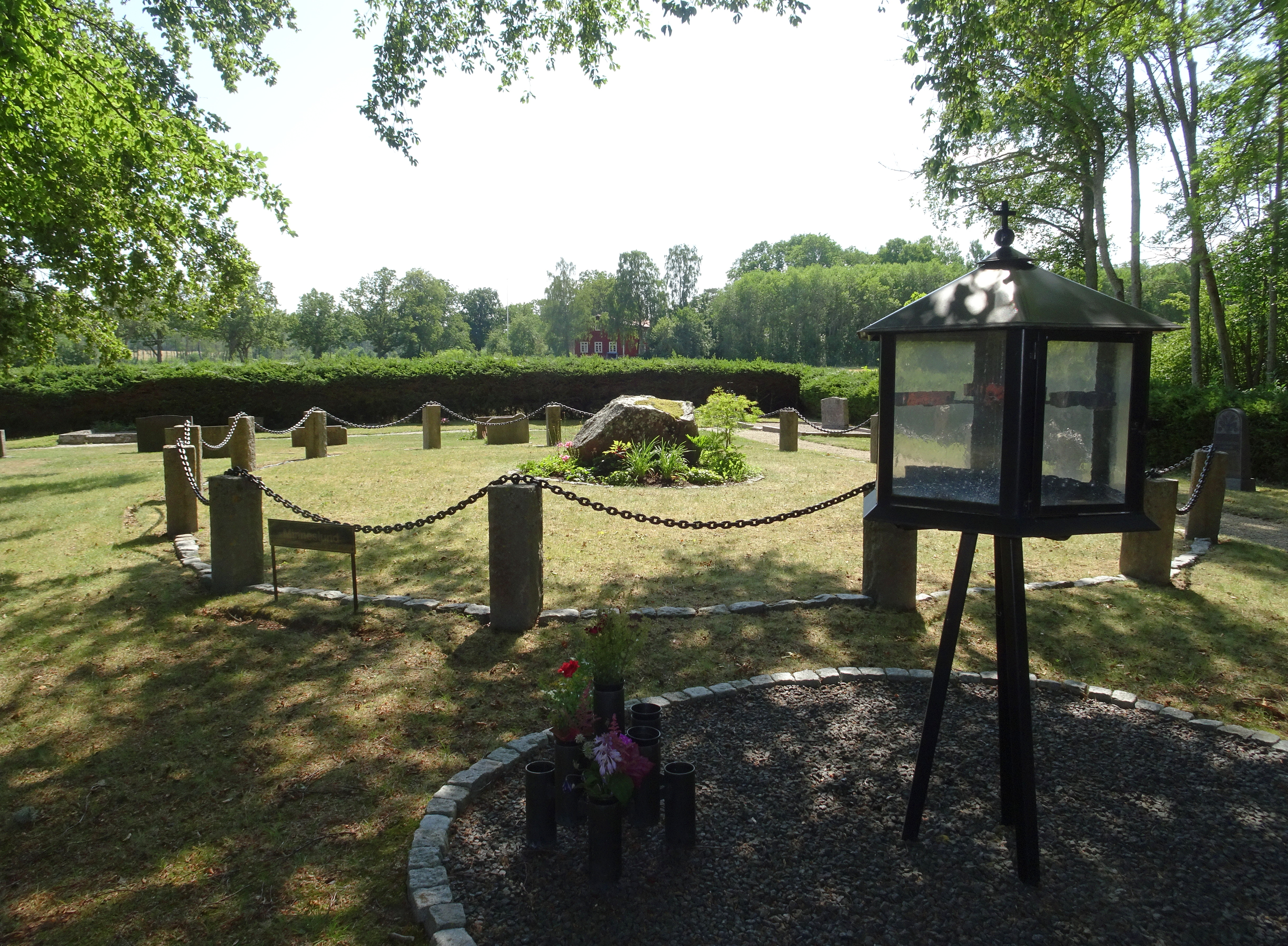 Taxinge kyrka, kyrkogården, minneslunden